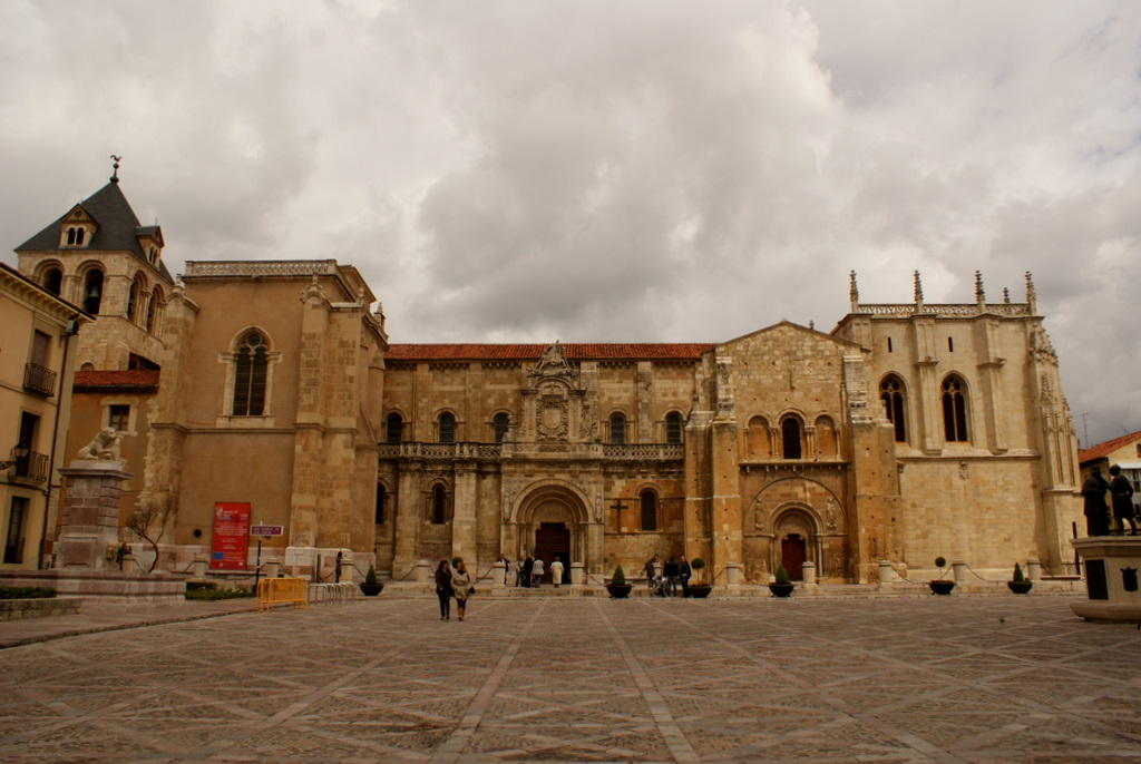 Sito en la ciudad de León, es uno de los conjuntos arquitectónicos de estilo románico más destacados de España, por su historia, arquitectura, escultura, y por los objetos suntuarios románicos que se han podido conservar. El conjunto fue construido y engrandecido durante los siglos XI y XII. Castilla y León